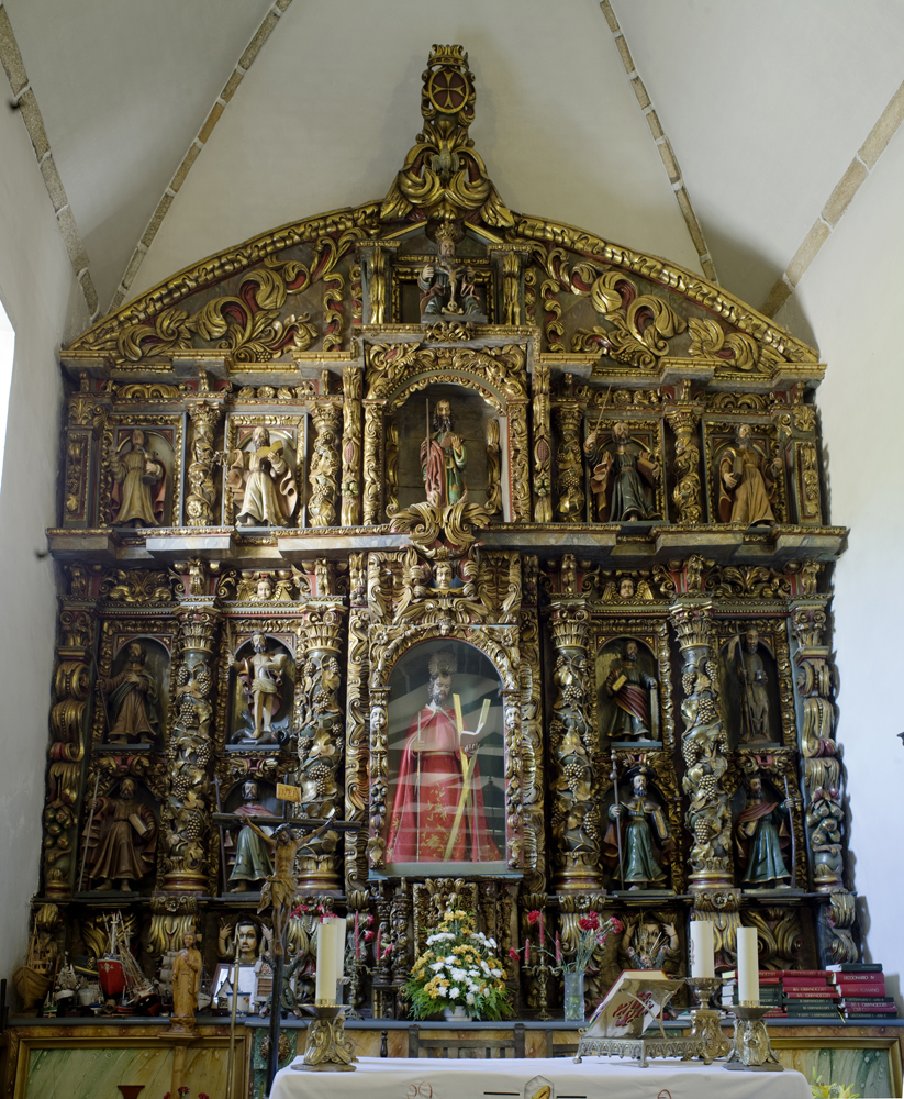 unidentified Cultural Heritage Spain